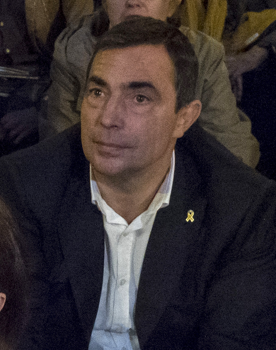 Asseguda davant de la delegació del Govern espanyol a Barcelona